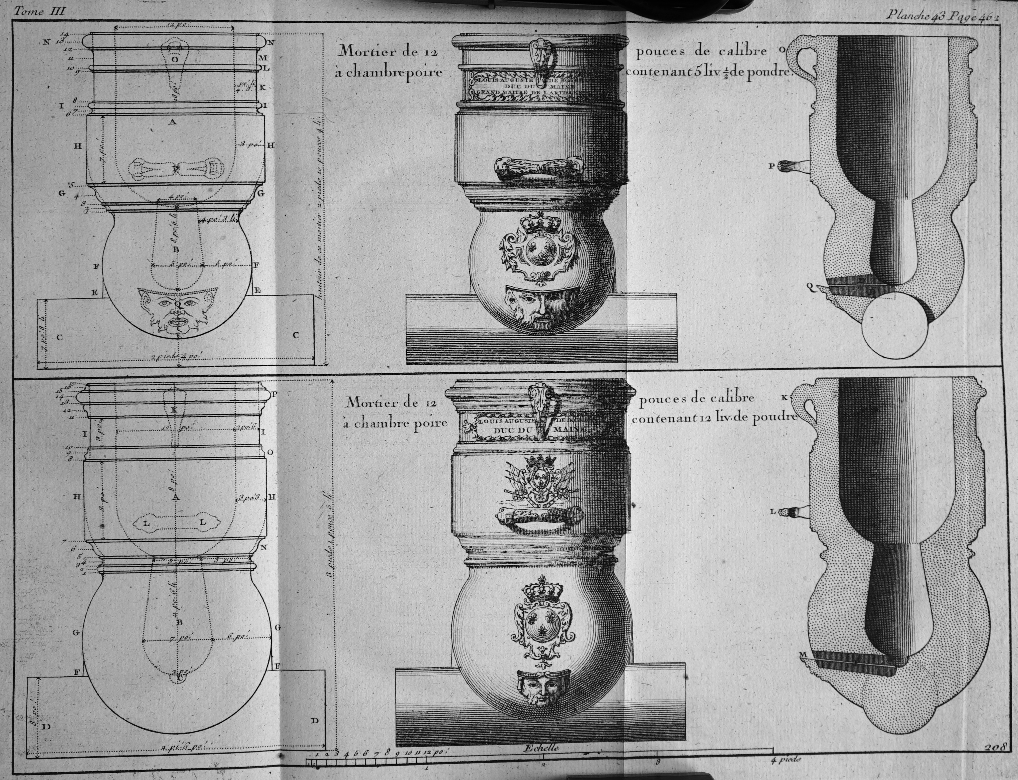 Mémoires d'artillerie, recueillis par M. Surirey de Saint Remy, tome III, exemplaire de la B.M. de Nancy, troisième édition. Mortiers à chambre en poire.